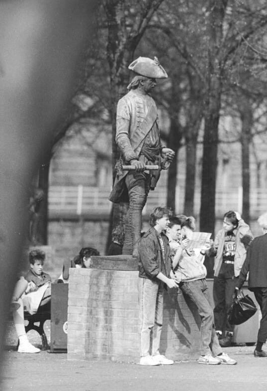 Berlin, Straßenszene, Museumsinsel ADN-ZB Mittelstädt 27.4.1988-erd-Berlin: Ein Frühlingsbummel vom Lustgarten zur Museumsinsel, Hauptanziehungspunkt für in- und ausländische Besucher, lohnt sich.